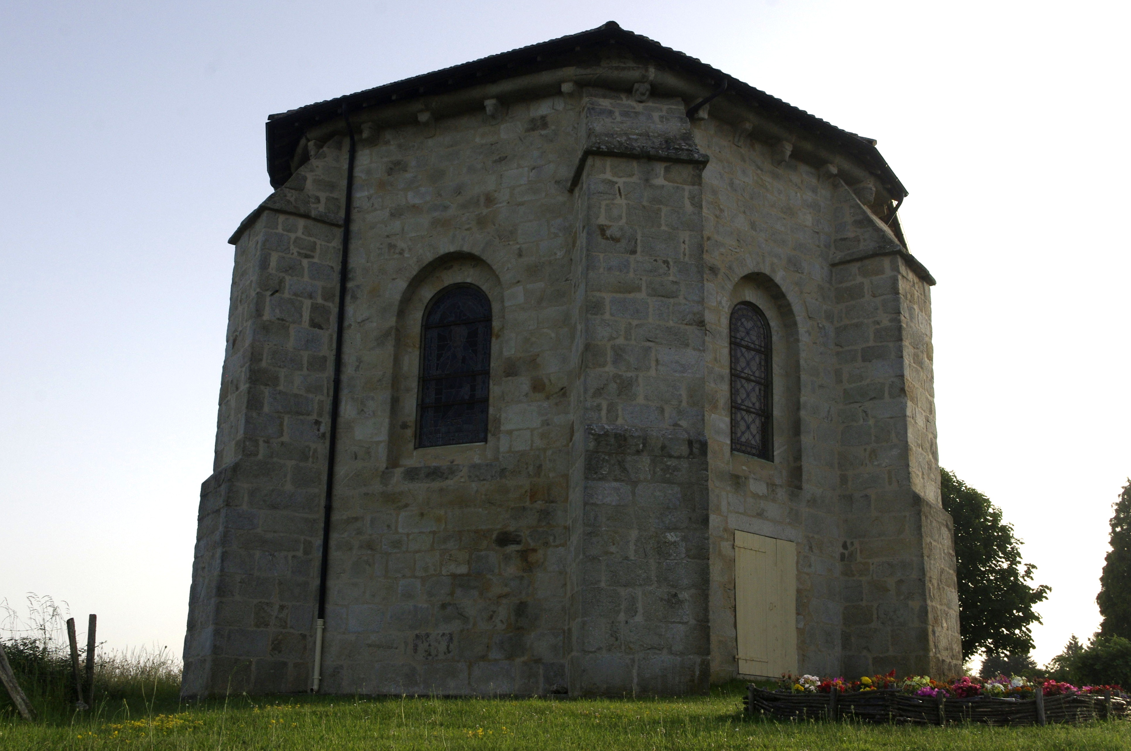 L'église Saint Nicolas Courbefy - commune de Bussière-Galand, Haute Vienne, France